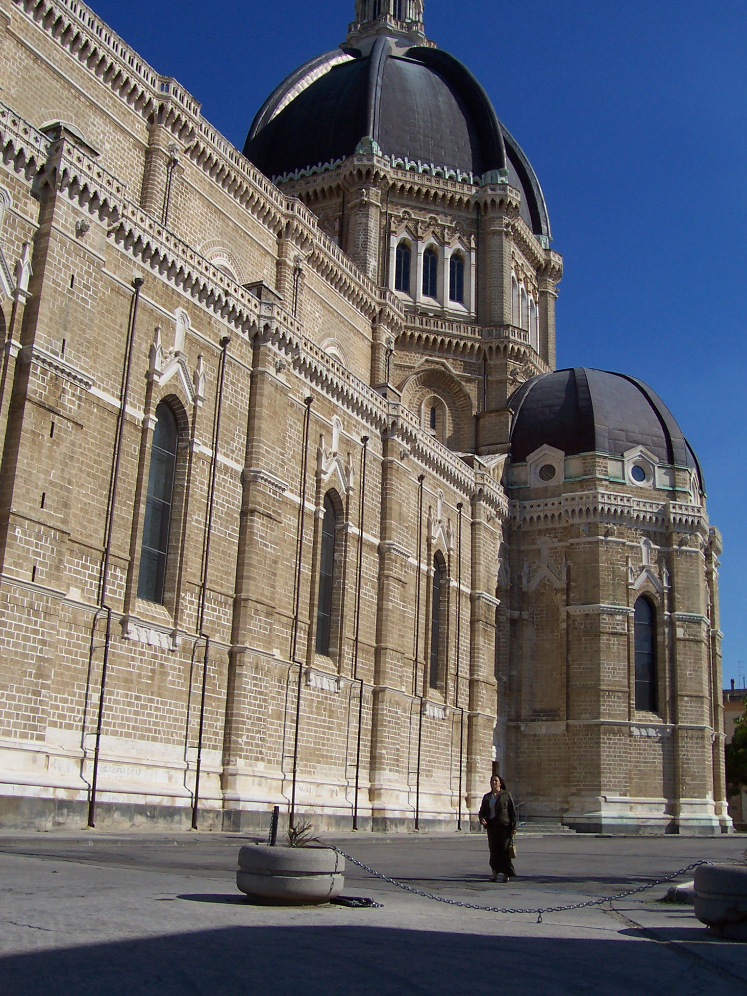 angela+duomo